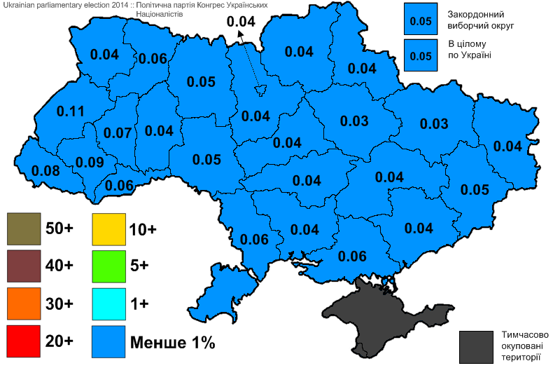 Результати виборів до Верховної Ради України, які відбулись 25 жовтня 2014 року. Інформація з офіційного сайту ЦВК. Політична партія Конгрес Українських Націоналістів